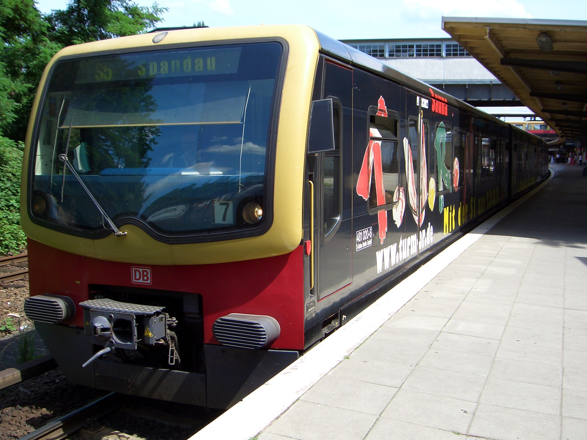 BR 481 mit Ganzzugwerbung "TURM" (481/482 020) in Berlin Ostkreuz